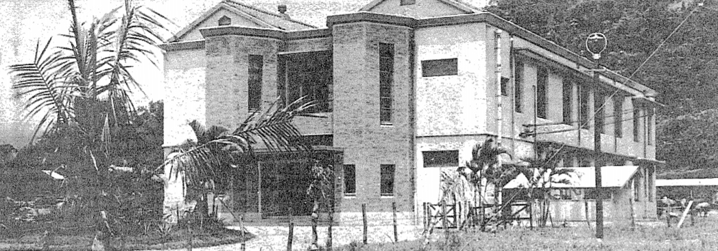 中文（台灣）: 士林支所於1939年落成，為一棟兩層樓建築